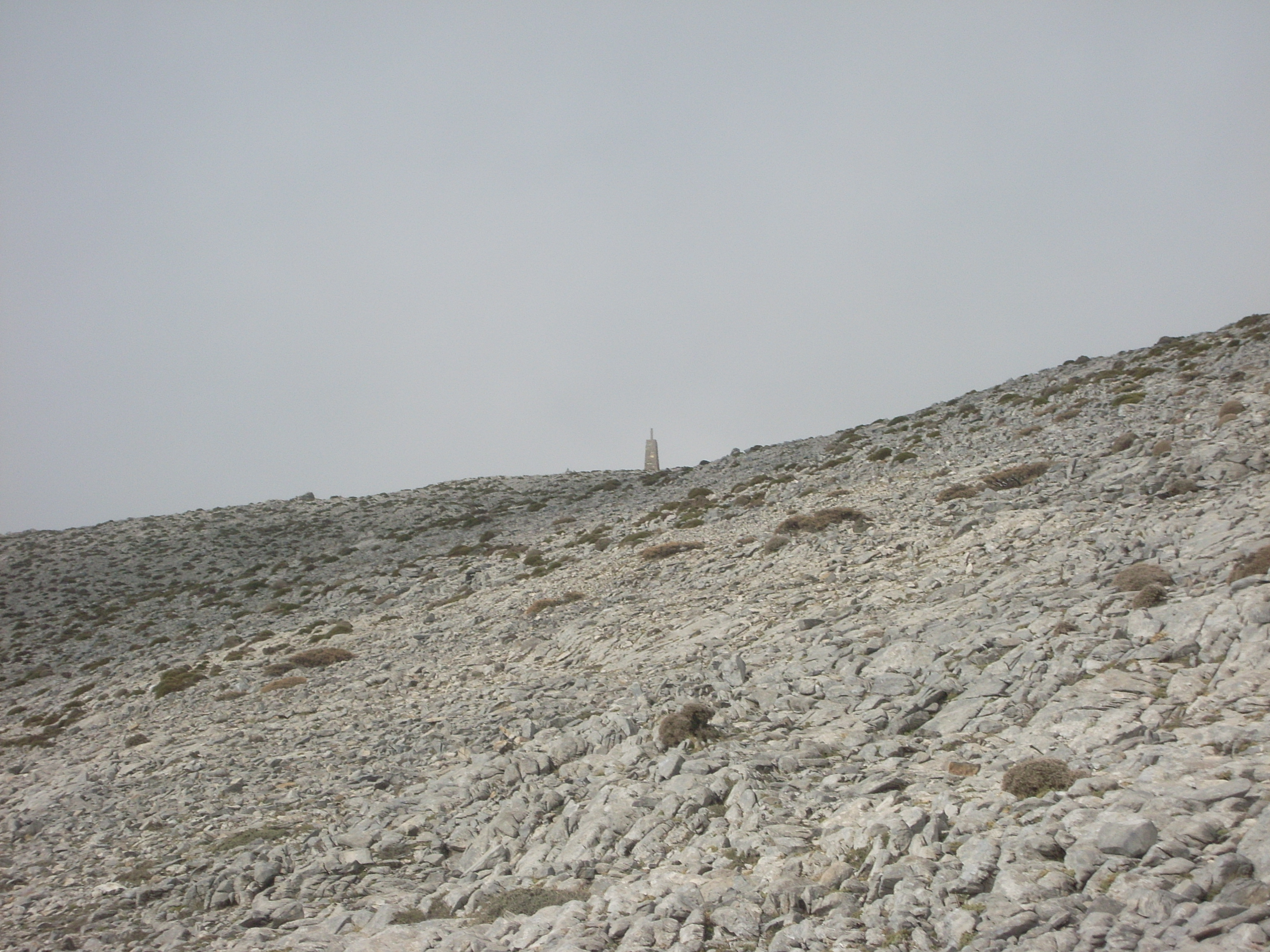 Vértice geodesico de la Maroma, Sierra de Tejeda, Málaga, España, noviembre de 2010